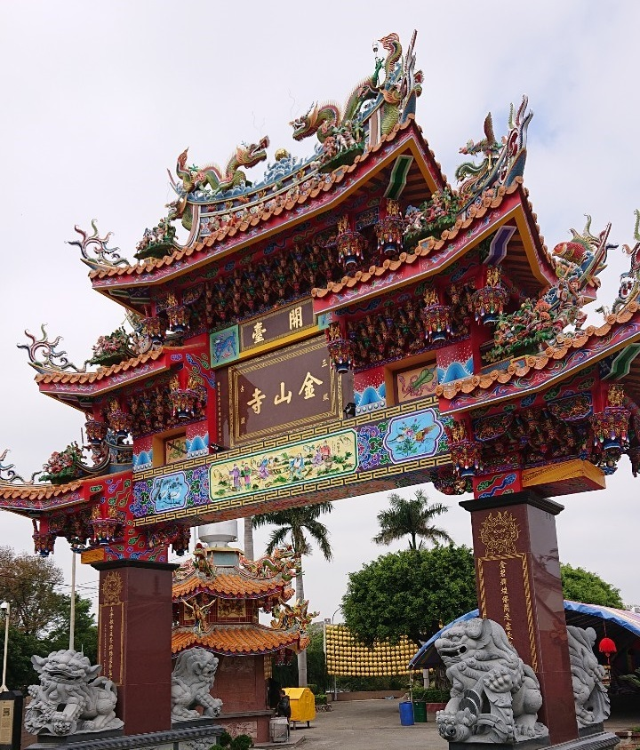 The gate of Hisnchu City Jin-Shan Temple.